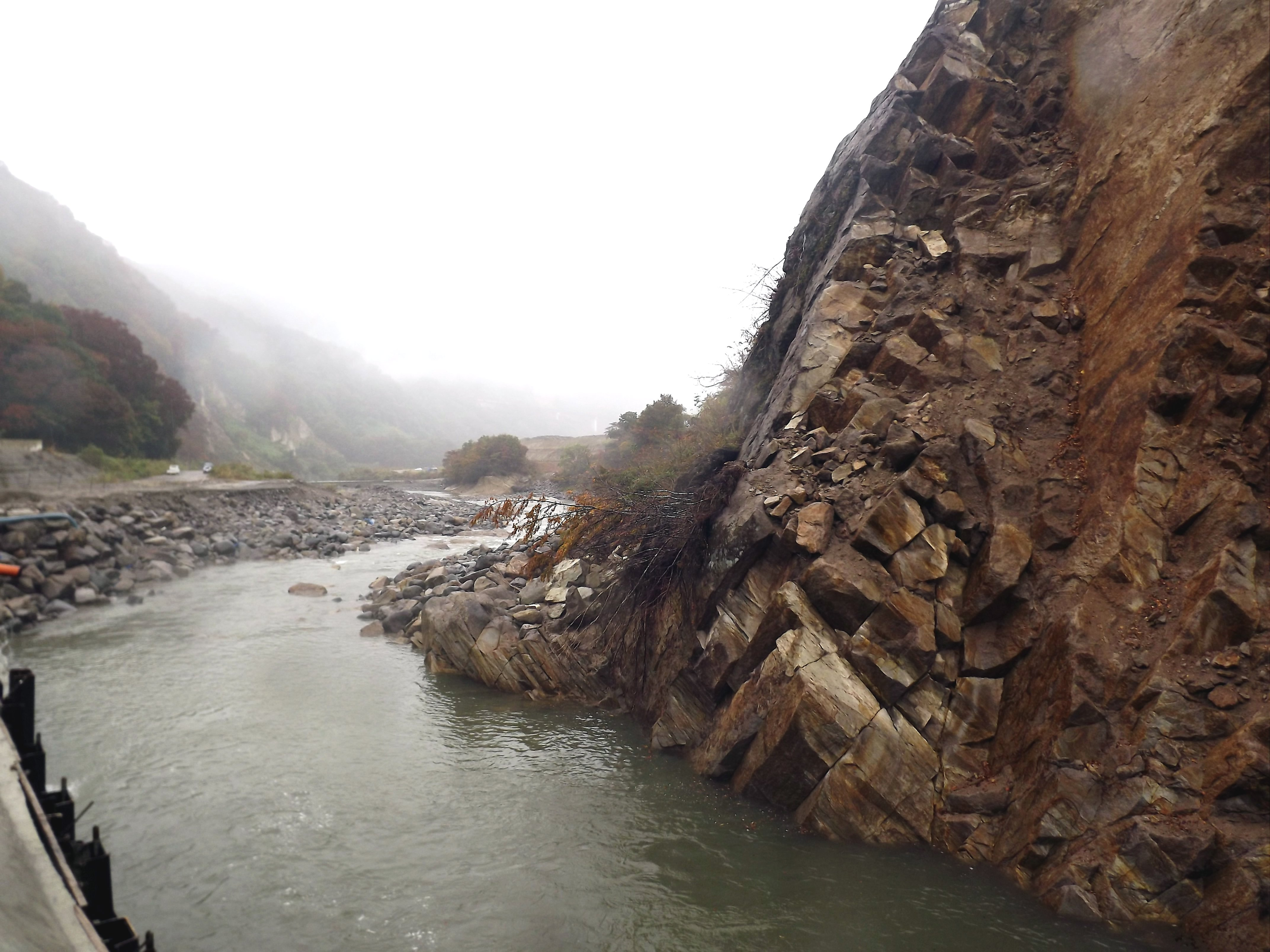 胆沢川（岩手県奥州市胆沢区。北上川水系）